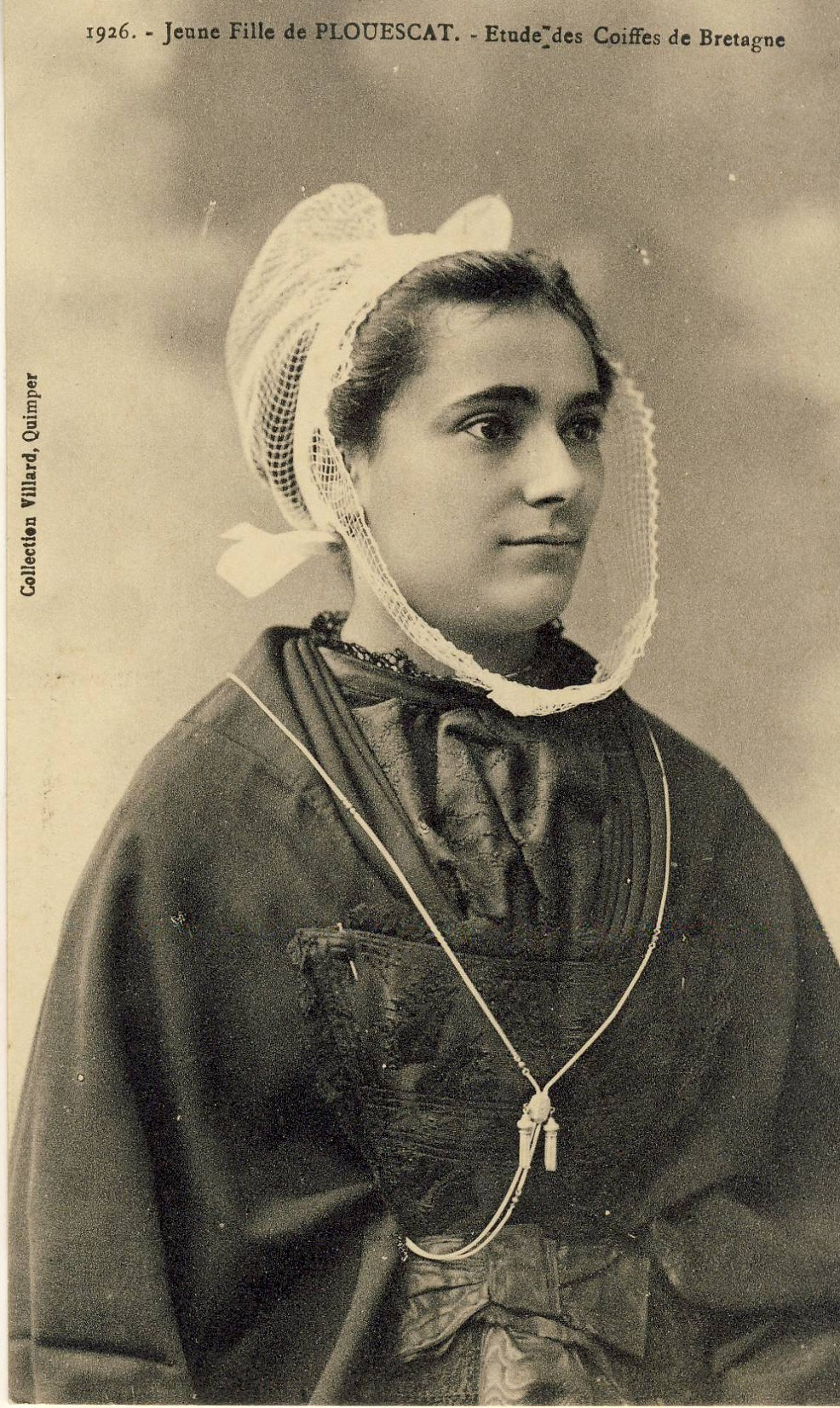 Jeune fille de Plouescat en coiffe traditionnelle (carte postale Villard)